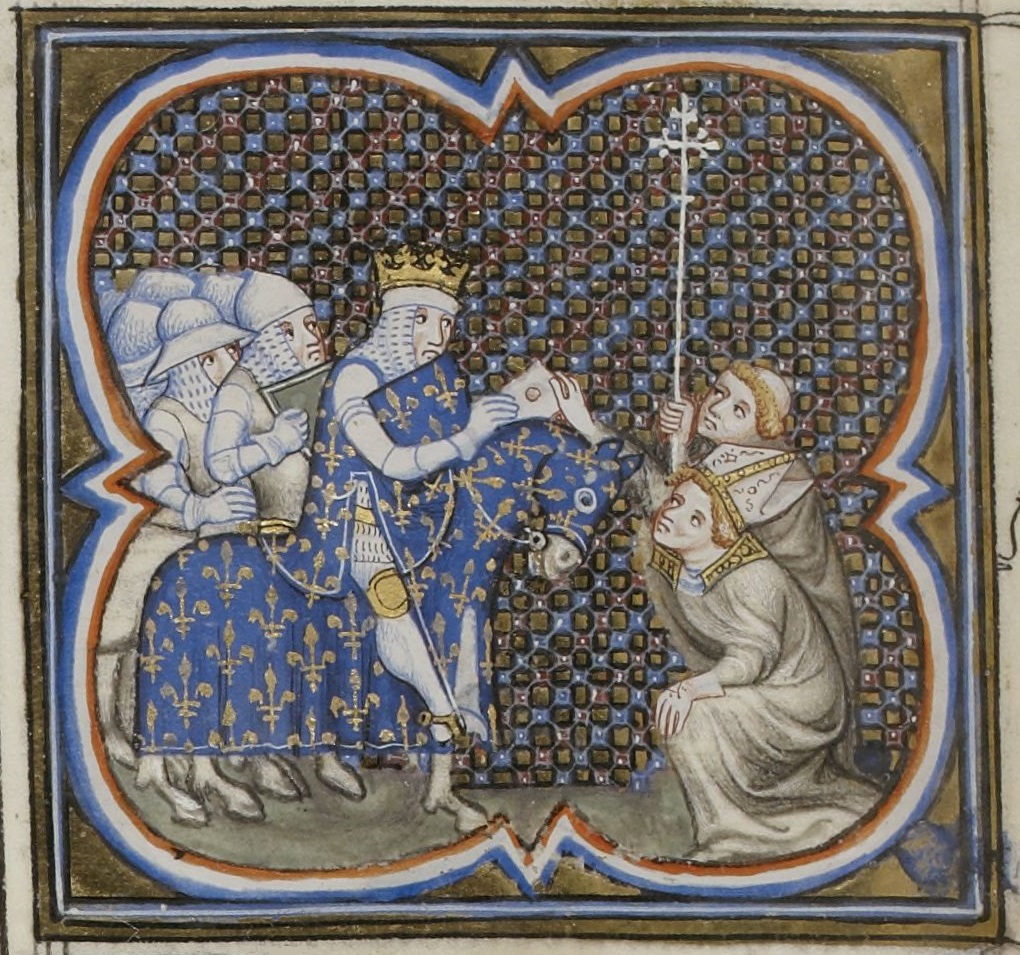 Louis VII supplié par Foucher, patriarche de Jérusalem. Enluminure des Grandes Chroniques de France, XIVe siècle. Paris, Bibliothèque nationale de France, Département des manuscrits, Français 2813, folio 216 verso.